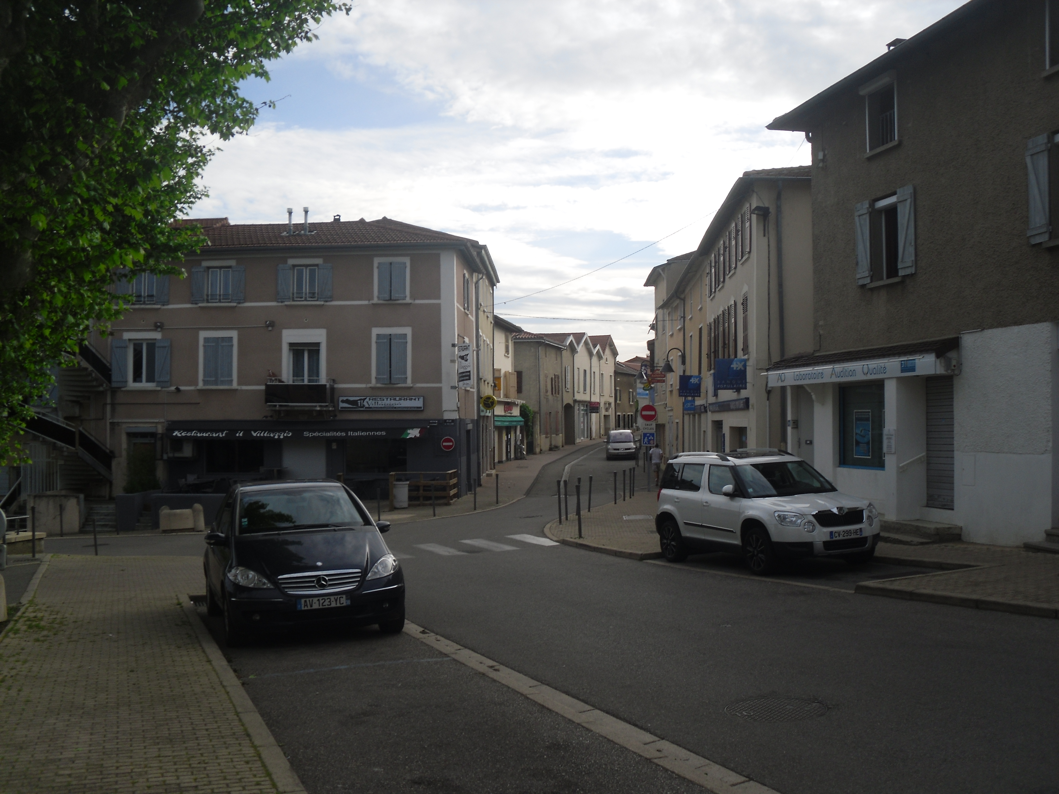 Vue de la rue centrale